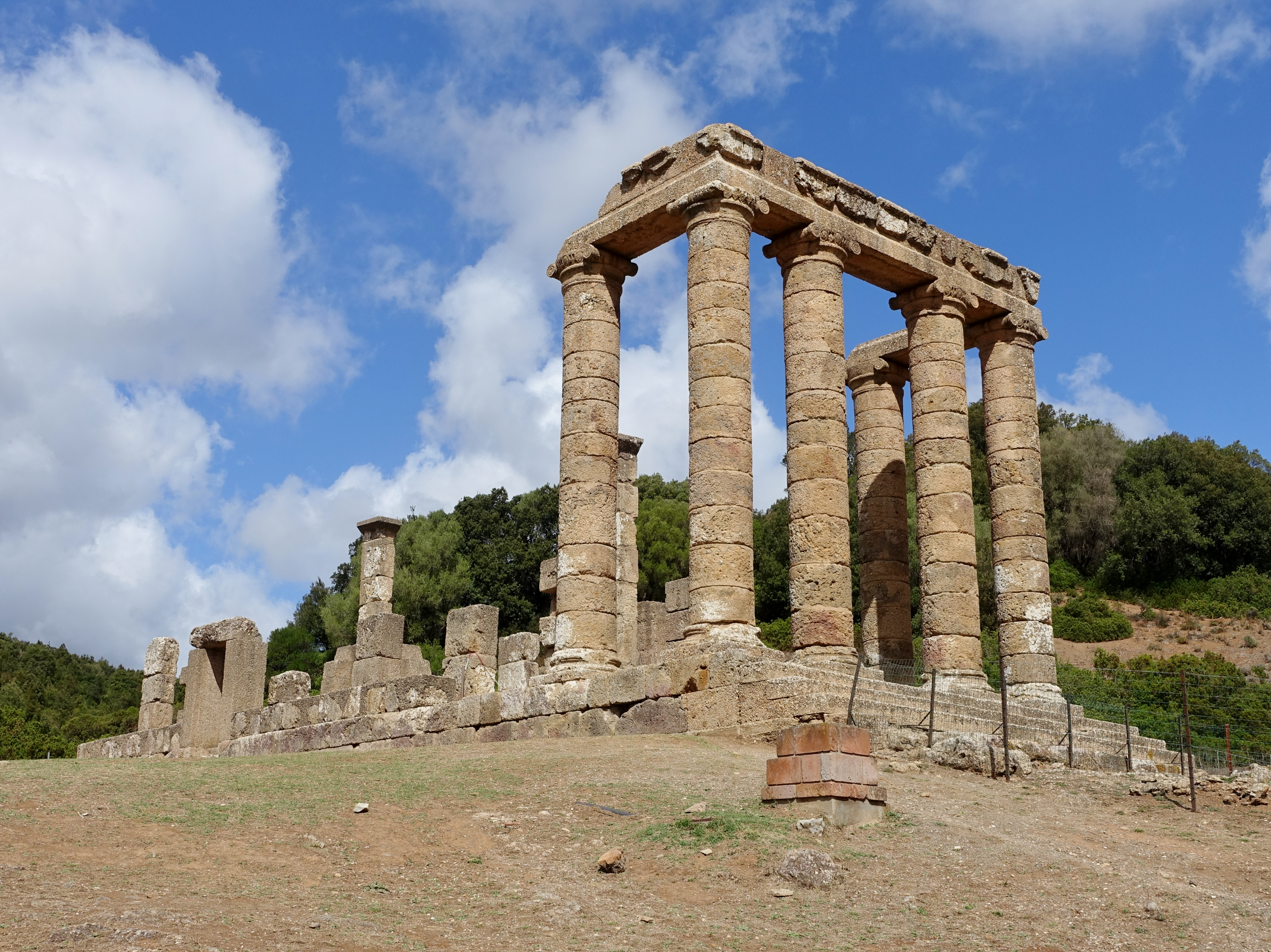 Römischer Tempel von Antas (Tempio di Antas), Gemeinde Fluminimaggiore, Sardinien, Italien